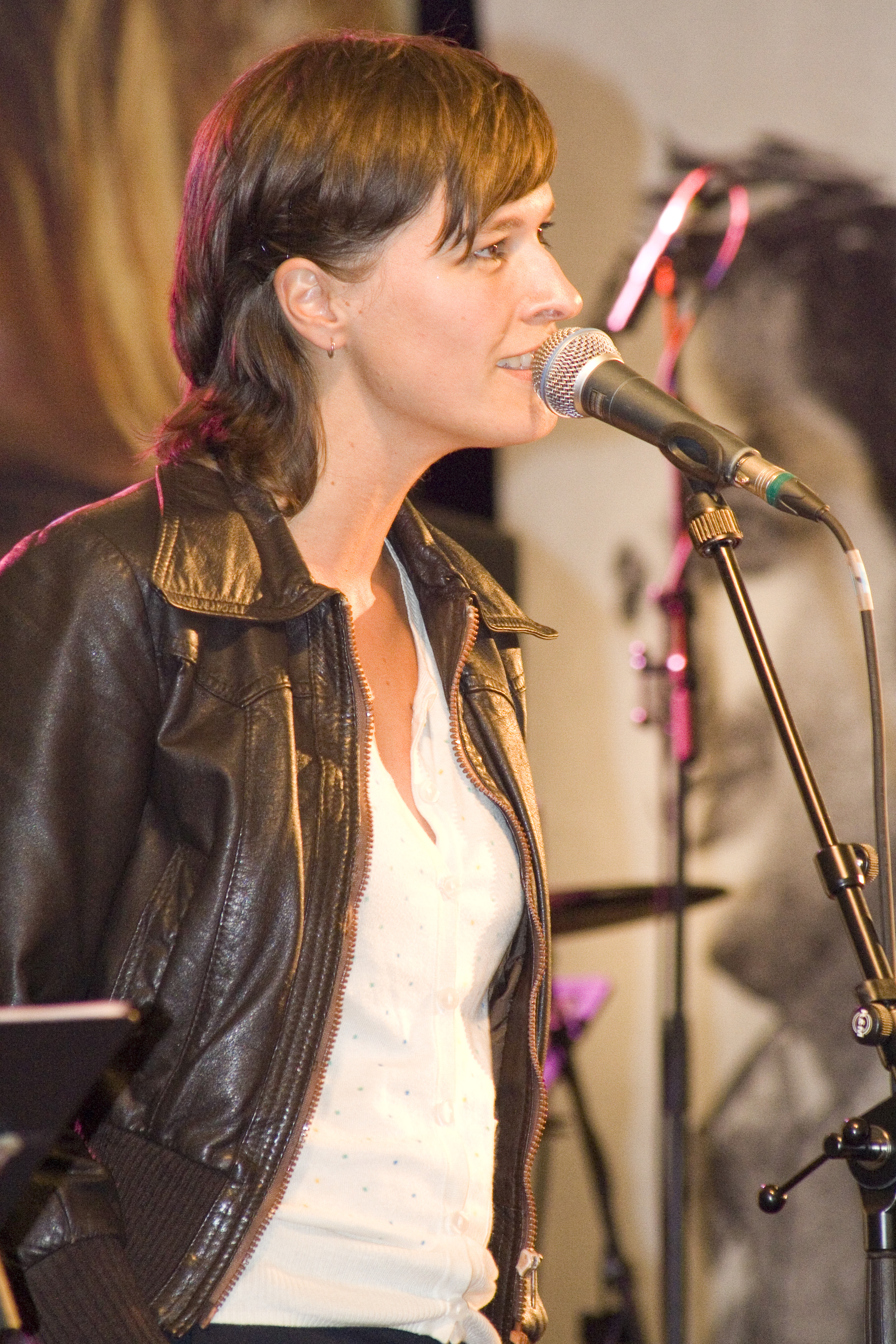 Eva De Roovere is een Vlaamse folkzangeres. -- Foto gemaakt tijdens "Song City" te Zottegem.